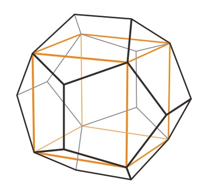 by CorelDraw